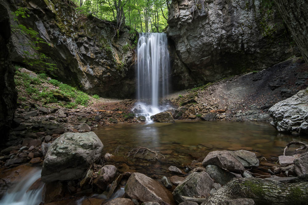 Καταρράκτης στο Παρθένο Δάσος Φρακτού This is a photography of Natura 2000 protected area with ID GR1140001